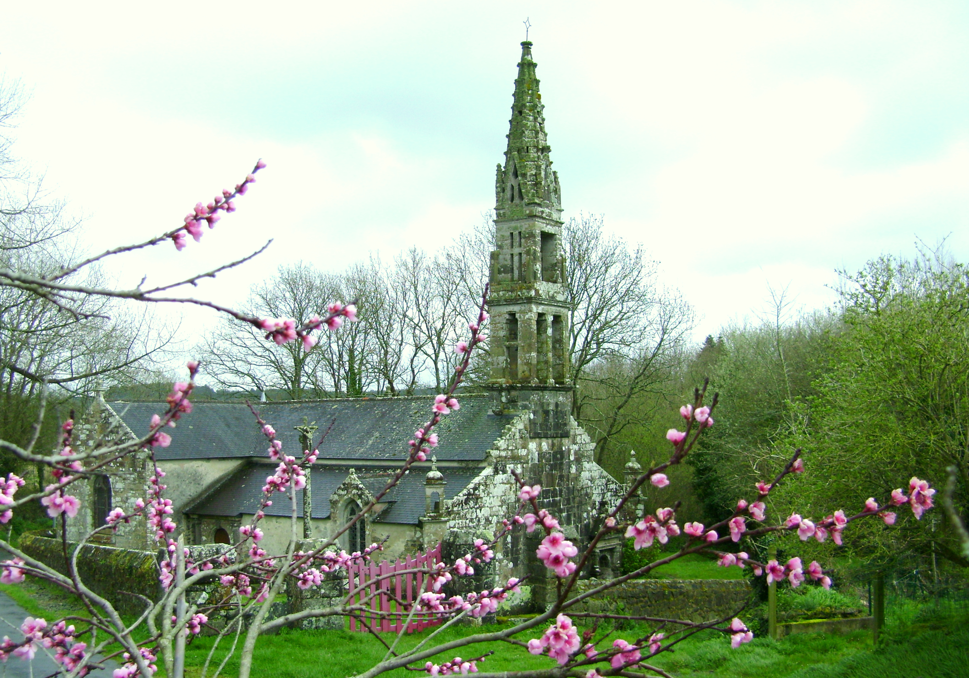 Chapelle Sainte-Marguerite au printemps.JPG